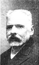 Popular maestro compositor, autor de la partitura de la revista La Gran Vía y de otras muchas zarzuelas, que ha fallecido en Madrid el día 18 del actual, obra del fotógrafo Kaulak.